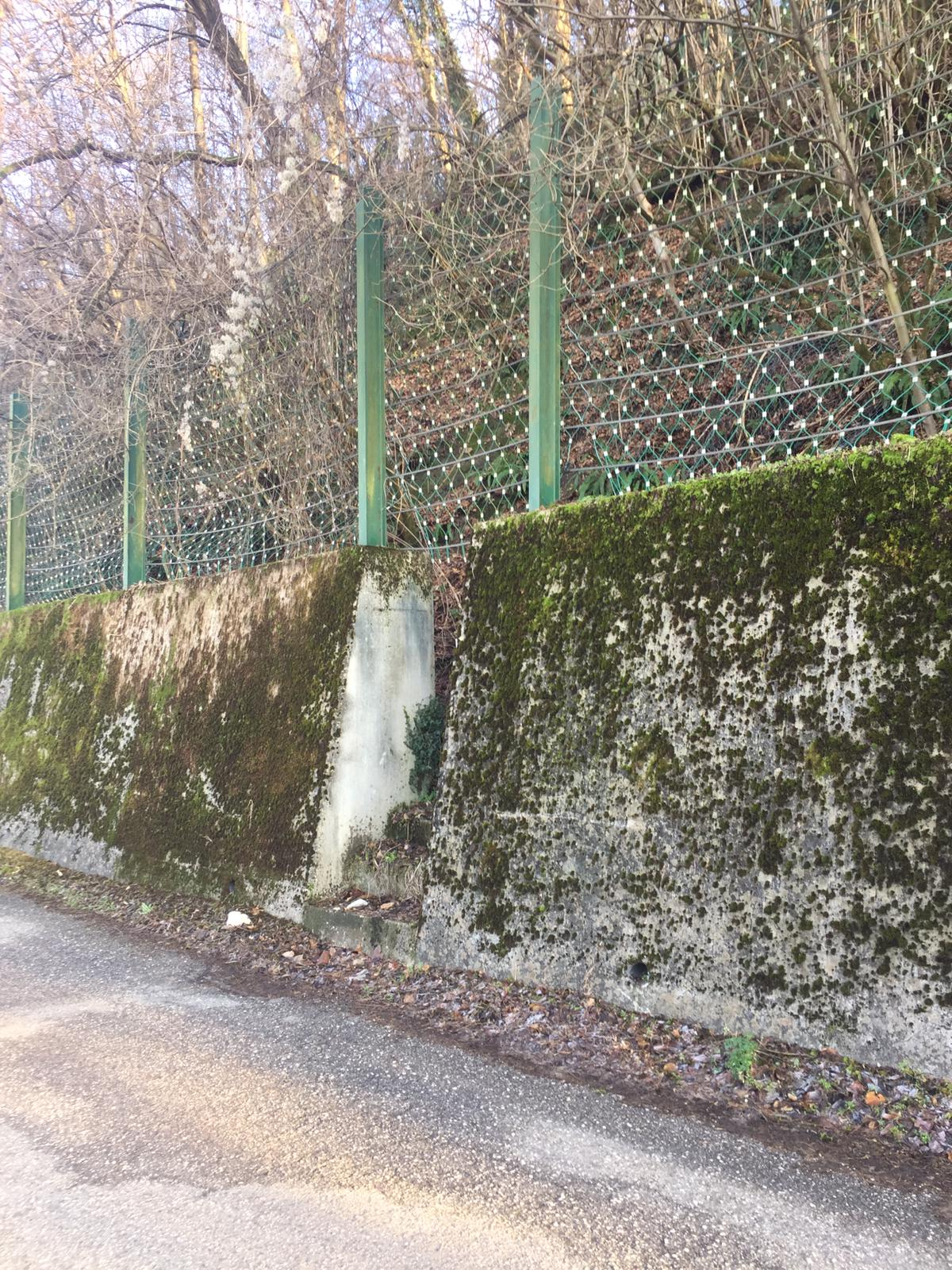 Accesso al sito dal lato sul fiume Torre